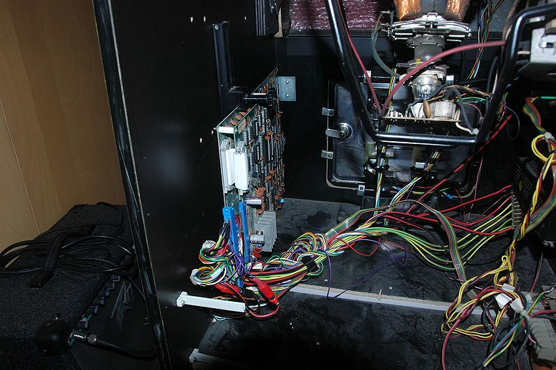 (La morsa fissaggio schede di un mobile da bar)